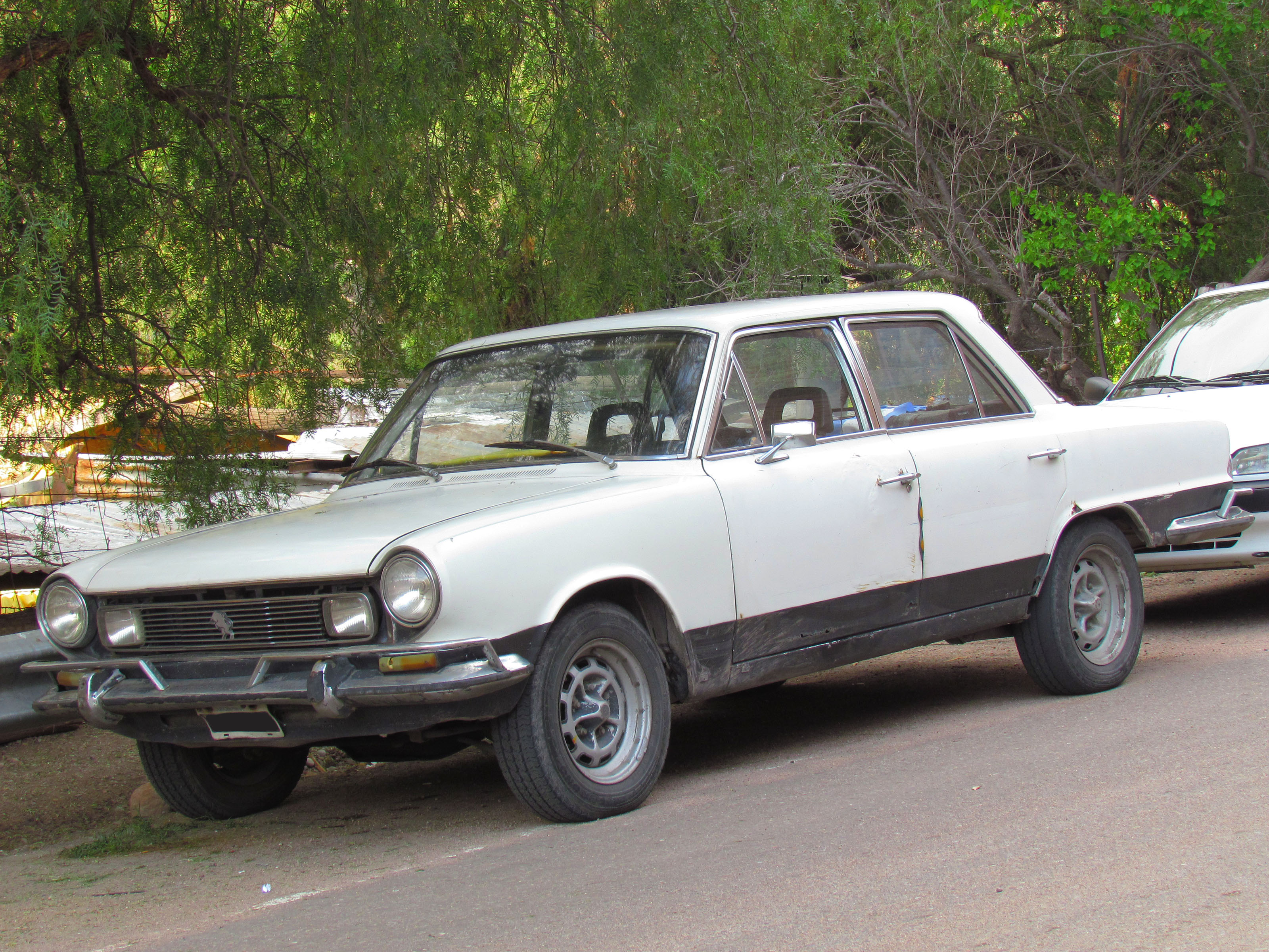 Ika Torino Sedan